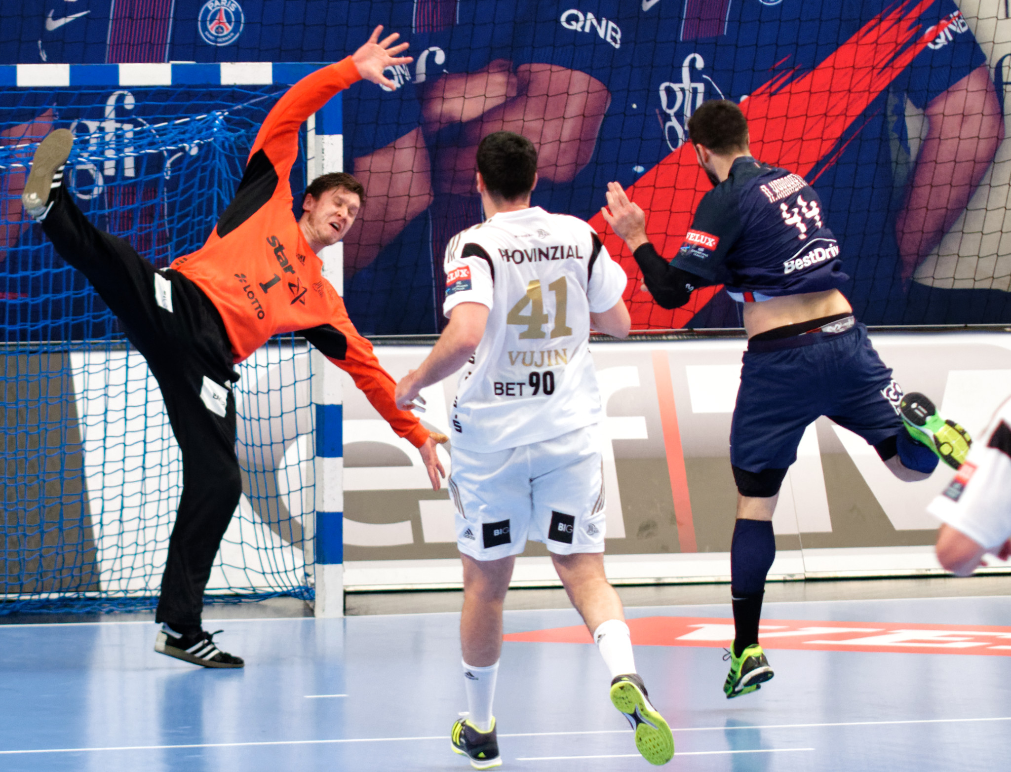 Rencontre de phase de groupe de la ligue des champions 2016-17 entre le PSG et le THW Kiel. A Coubertin, le 12 mars 2017.